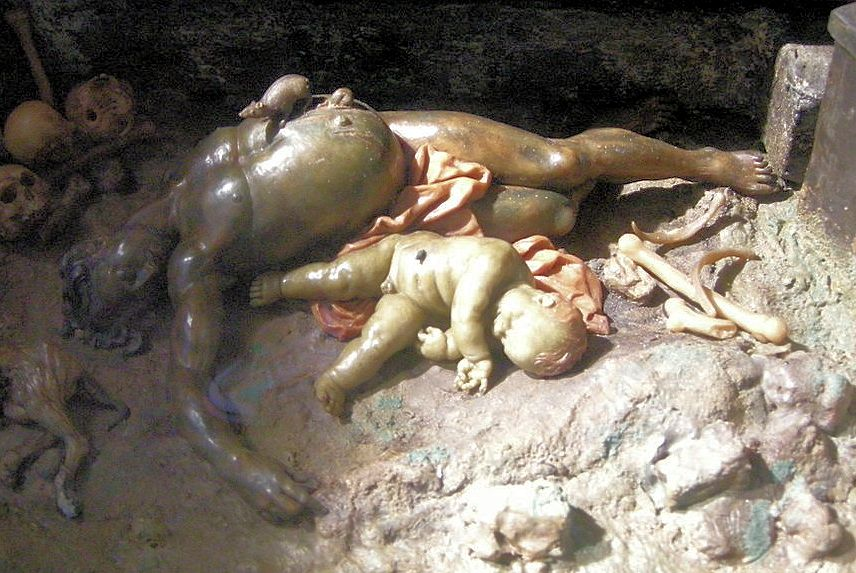 Zumbo Pest Detail